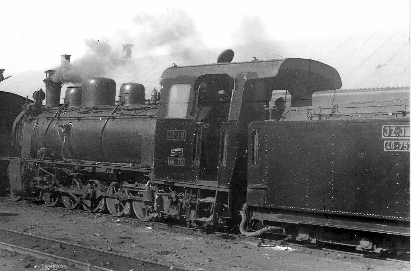 1-E-1 Schlepptender Schmalspurlok HF 40-751, 1965 im Neretwatal, Jugoslawischen Eisenbahn